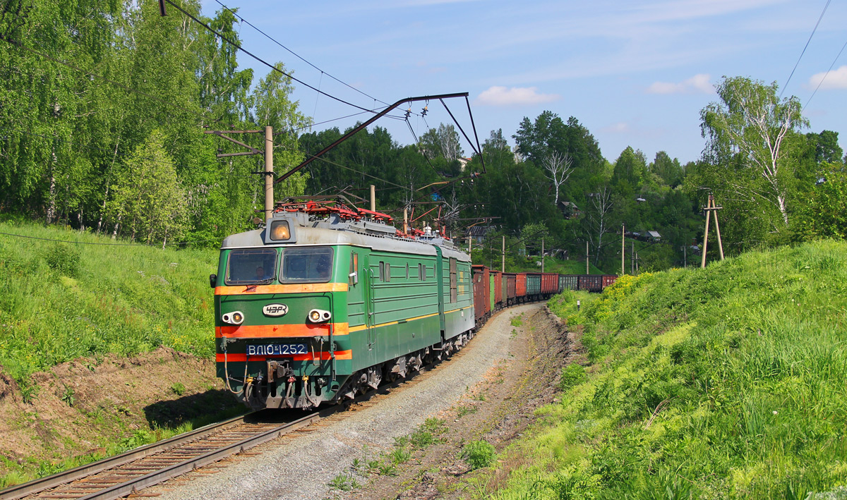 Фото взято с разрешения автора с сайта